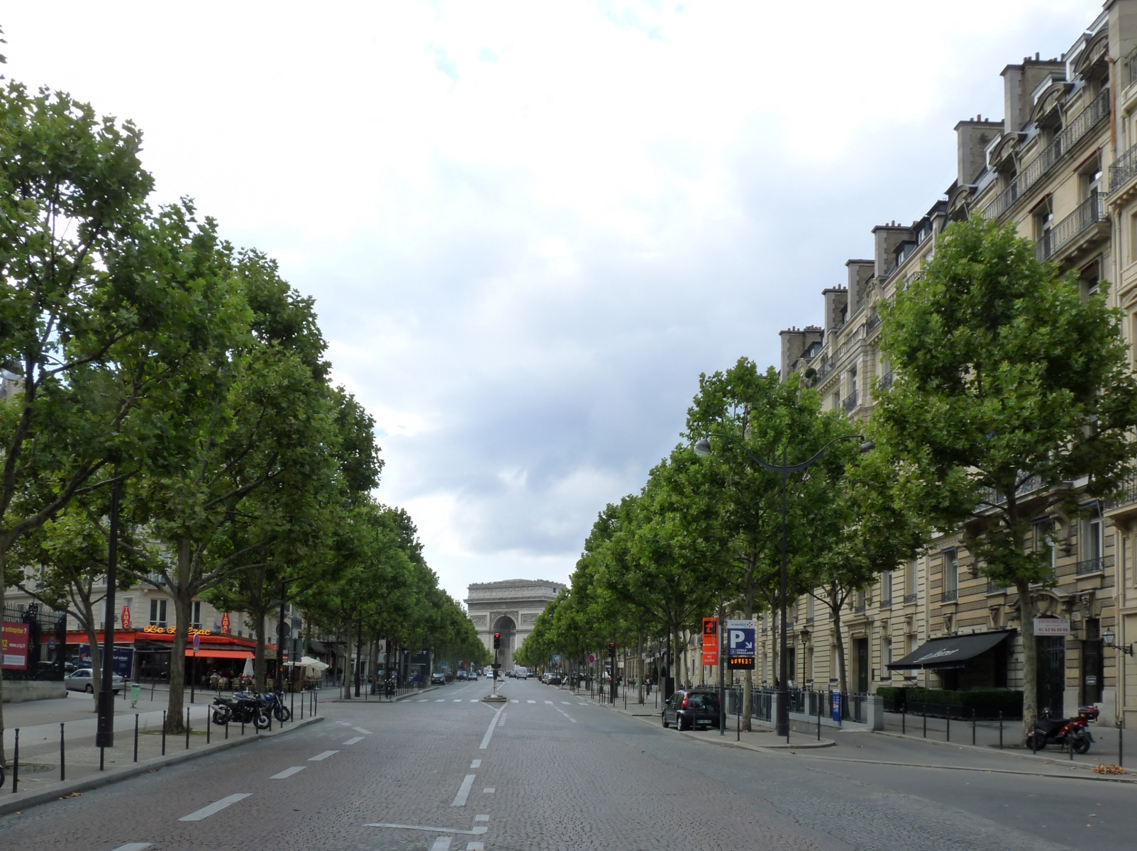 L'avenue de Friedland à Paris. Au fond, l'arc de triomphe.